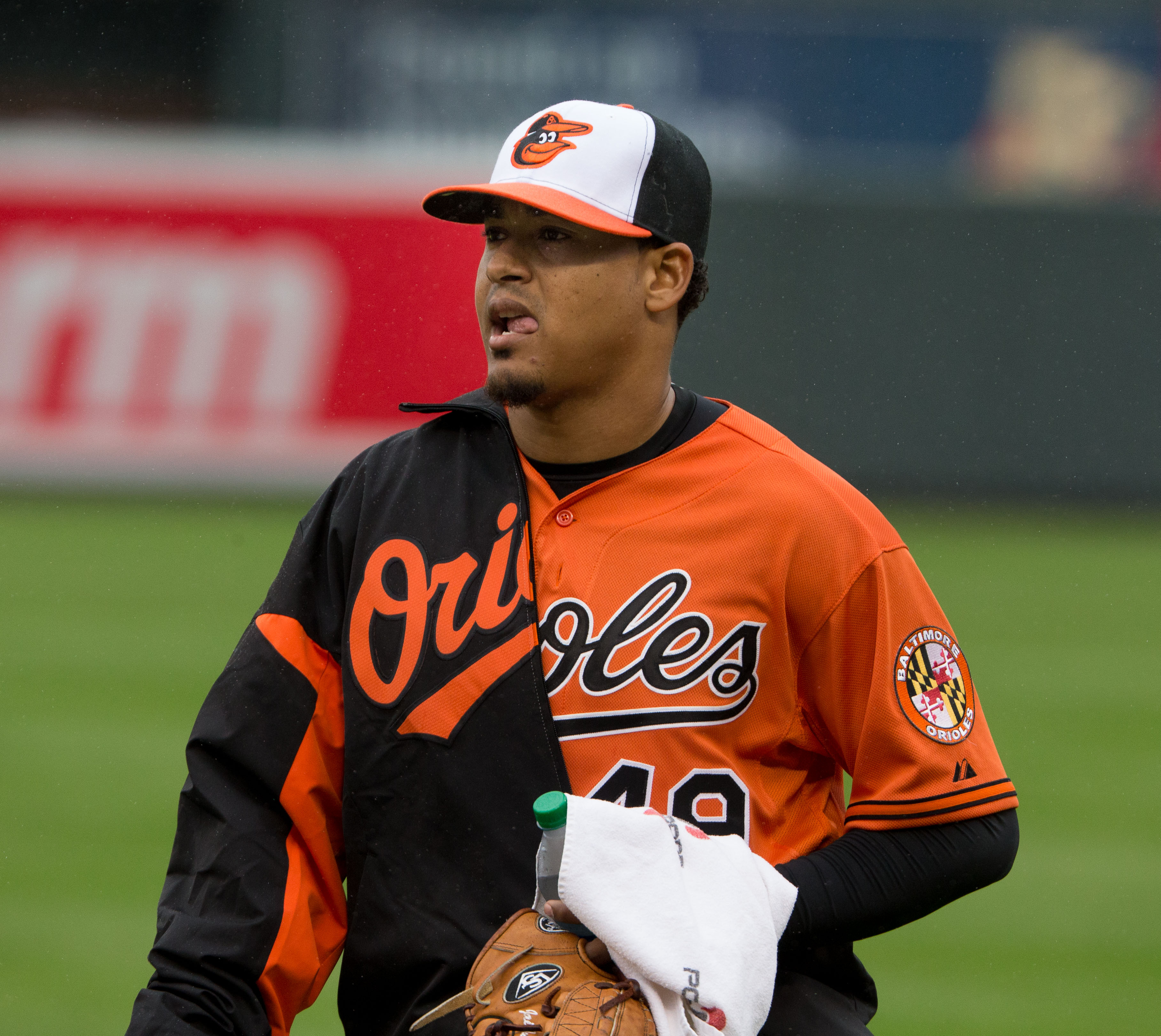 Jair Jurrjens